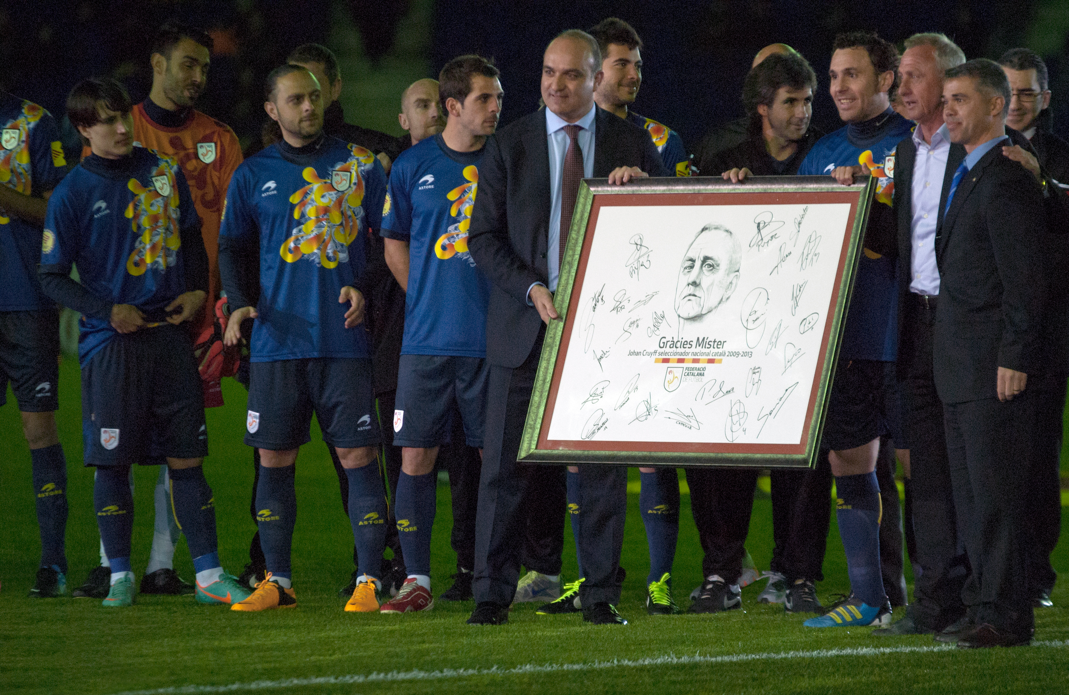 Homenatge a Cruijff, seleccionador de Catalunya, 2013.